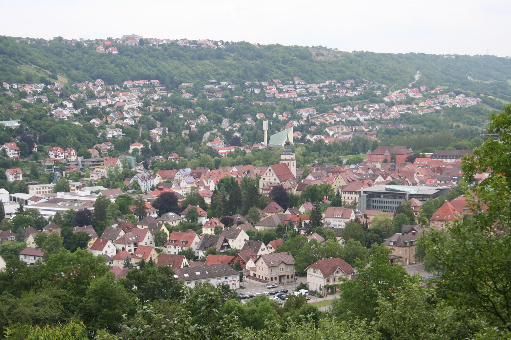 Das Bild zeigt einen Teil Künzelsaus vom "Lindle" aus gesehen.